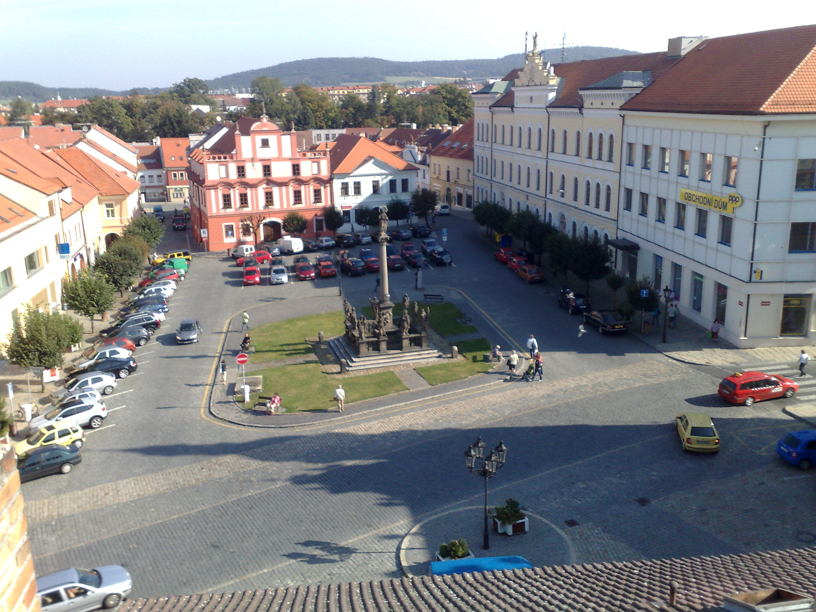 Písek, Alšovo náměstí (Malé náměstí) ze střechy masny.